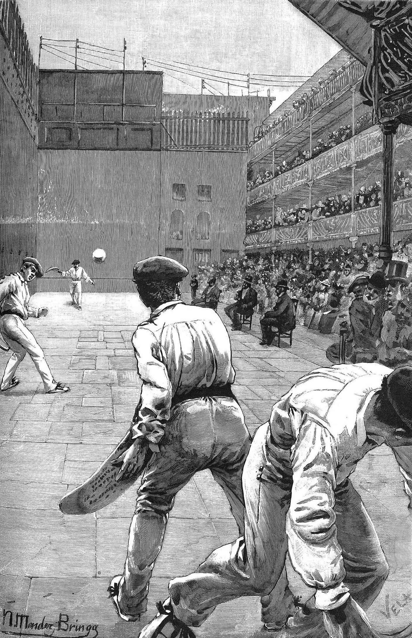 El Jai-Alai madrileño.